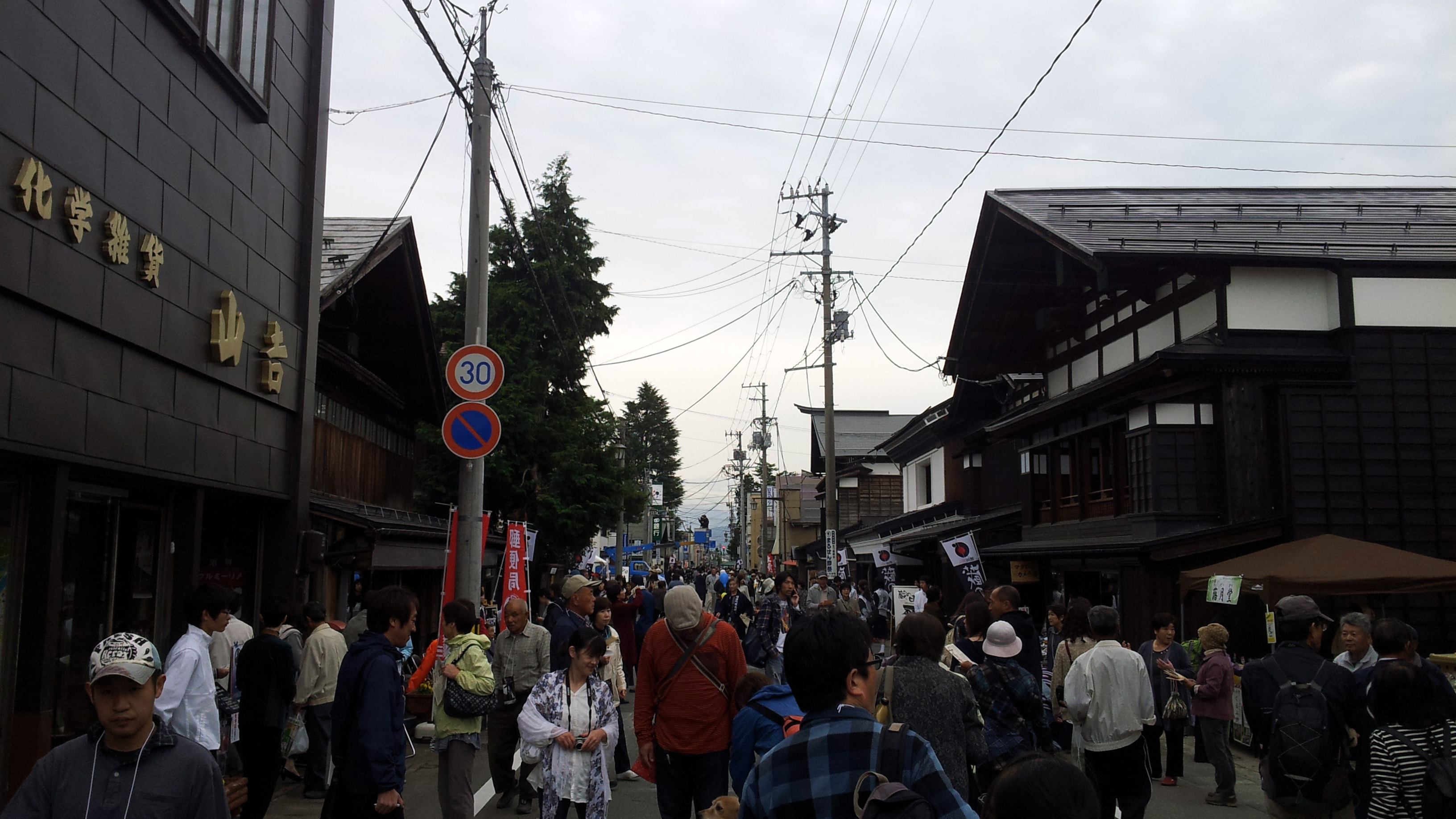 第９回「蔵の日」